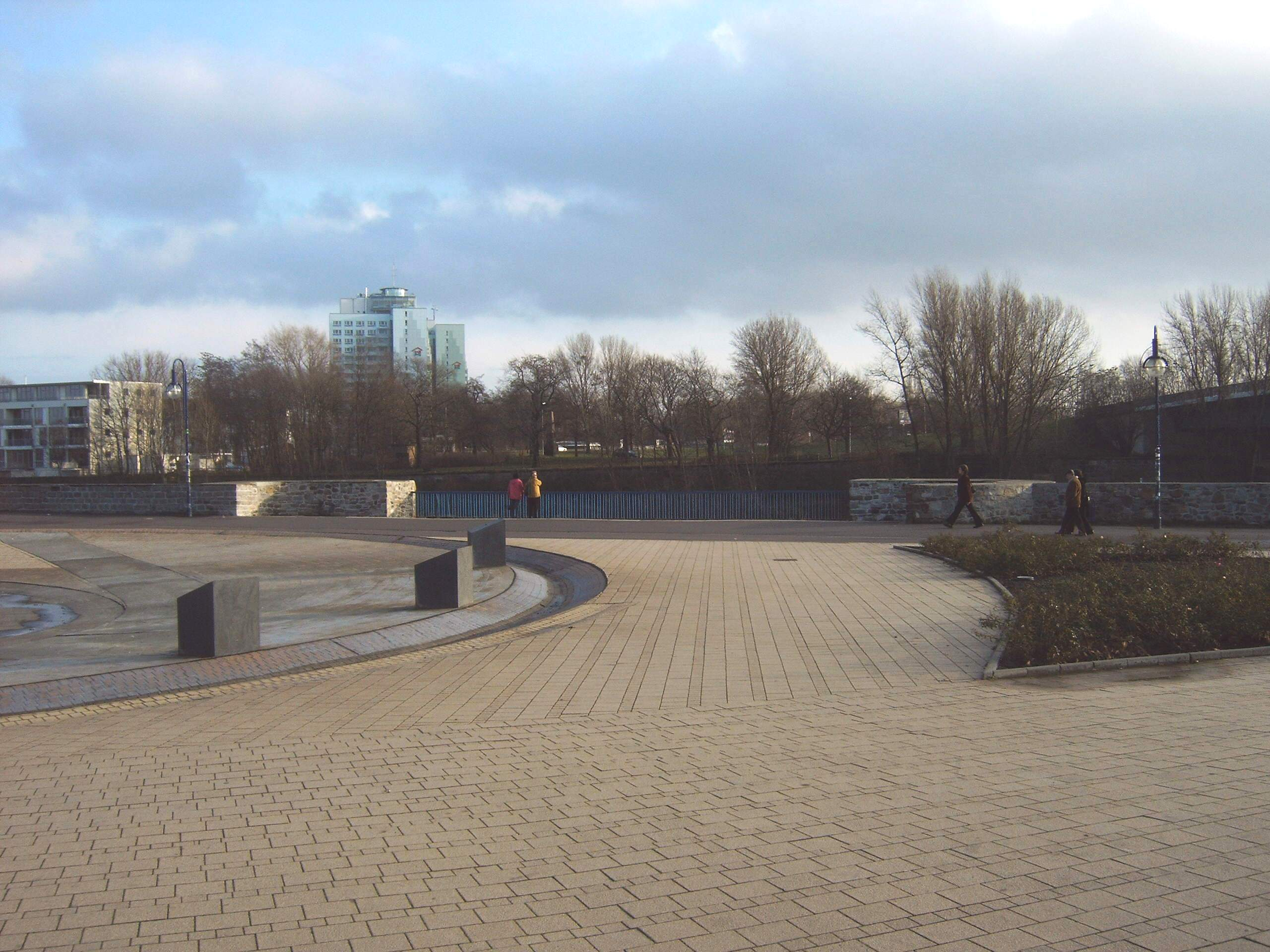 westliches Elbufer in Magdeburg, Schleinufer, ehemaliges Gelände des Neuen Brücktores